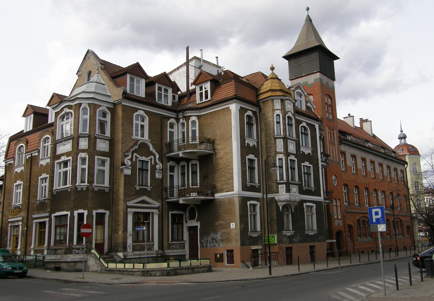 Fotografia poczty w Sopocie wykonana 8 kwietnia 2007 r. przez Jana Burnewicza aparatem Olympus SP-550UZ